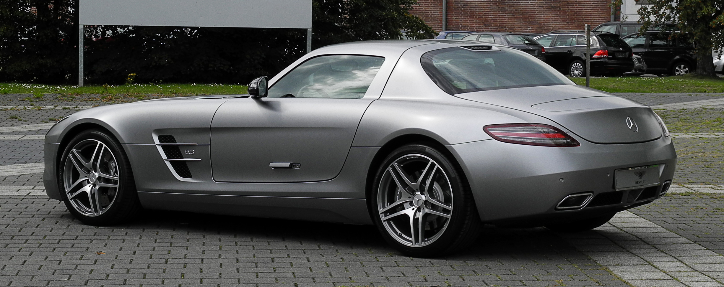 Mercedes-Benz SLS AMG (C 197)